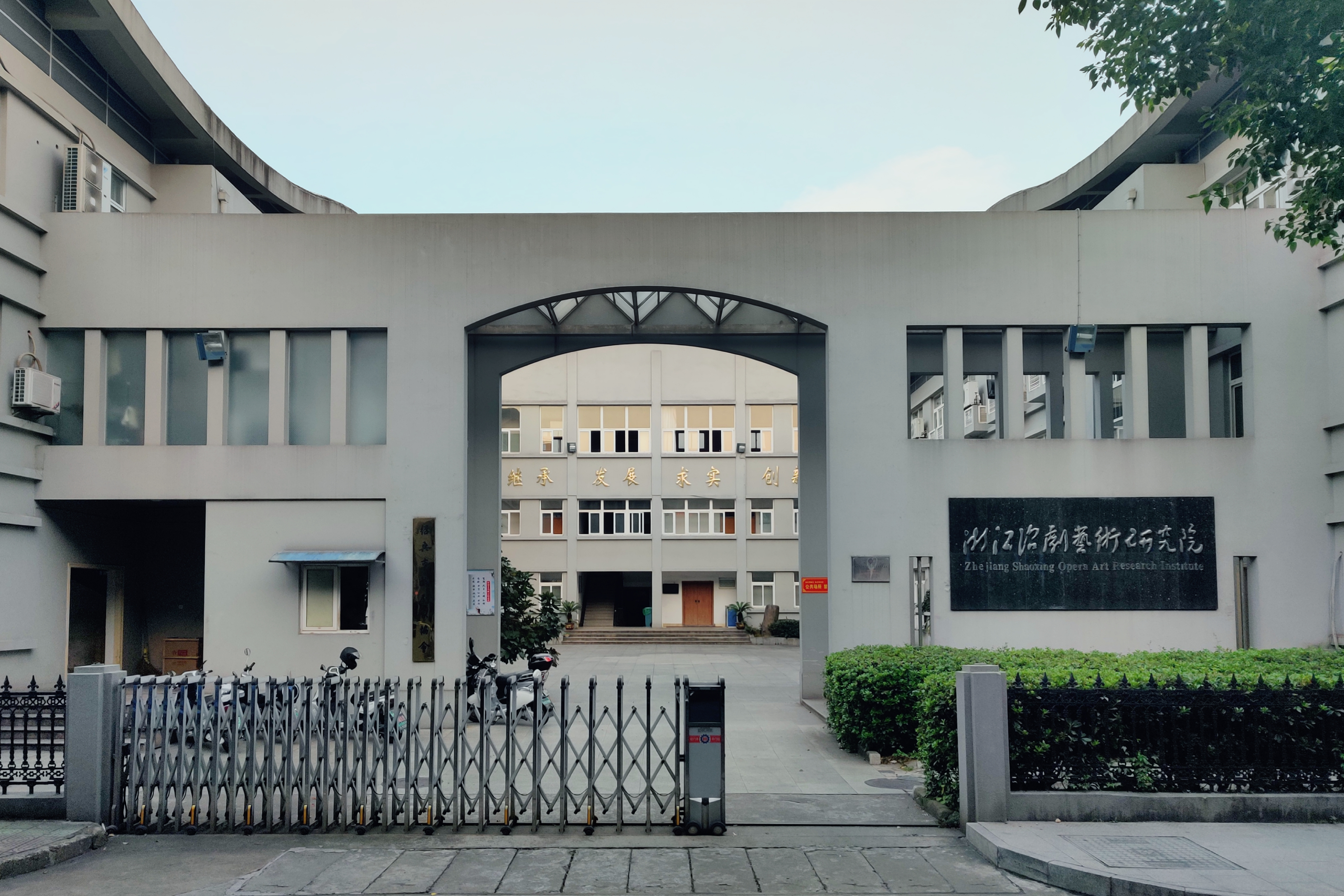 中文（中国大陆）: 浙江绍剧艺术研究院